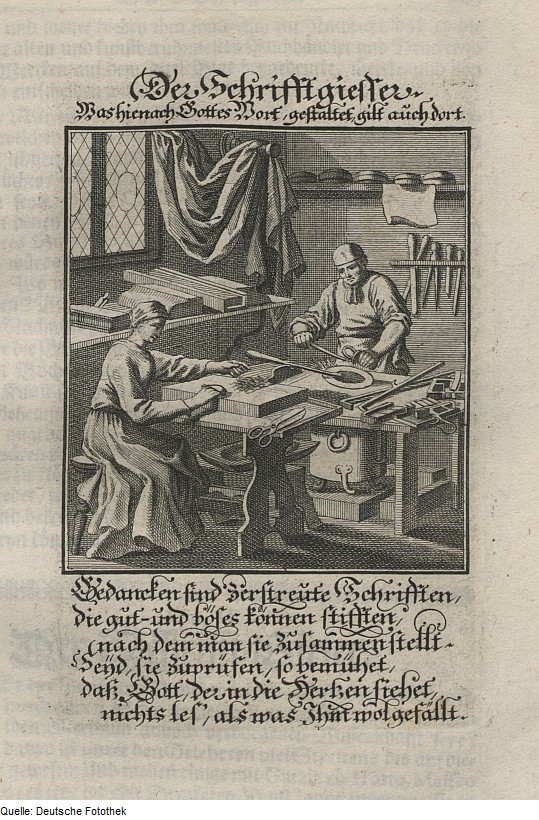 Original image description from the Deutsche Fotothek Ständebuch & Beruf & Handwerk & Gießer & Letter